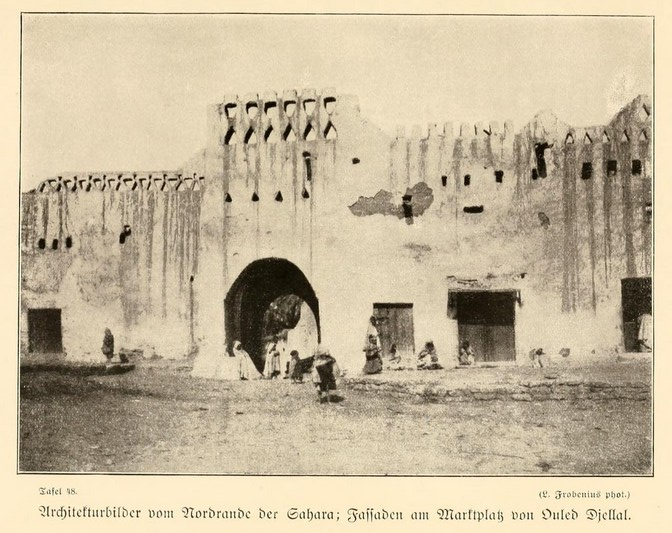 “Gebäude am Marktplatz der Stadt Ouled Djella am Nordrand der Sahara” - from Expeditionsbericht der Zweiten Deutschen Inner-Afrika-Expedition (1907-09) Auf dem wege nach Atlantis.